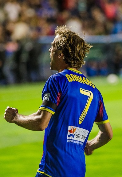 José Javier Barkero